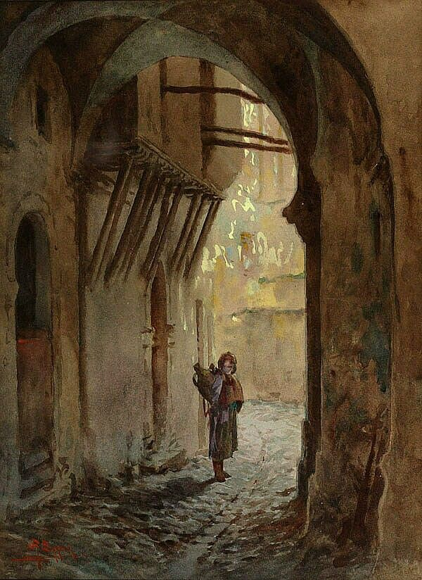 Une ruelle dans la Casbah